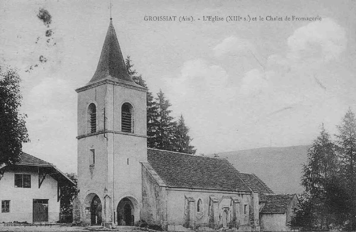 Église Notre-Dame de Groissiat et chalet de fromagerie